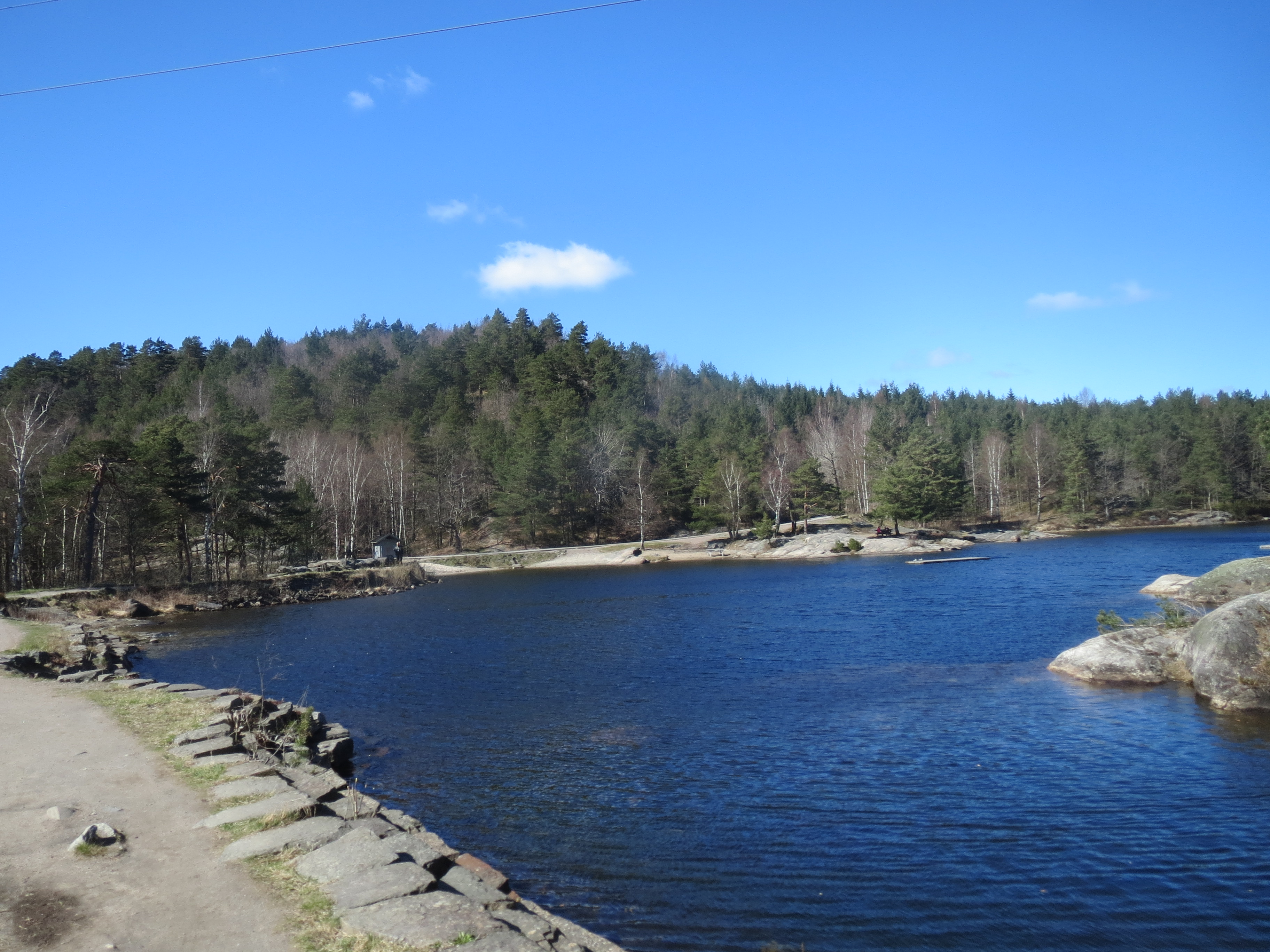 Øvre Jegersbergvann i Kristiansand, april 2016